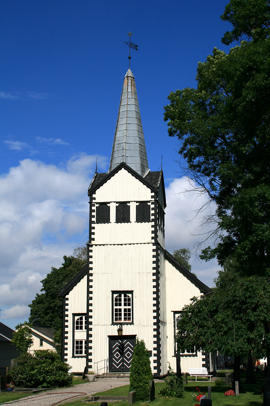 Vestsiden kirke, Porsgrunn.